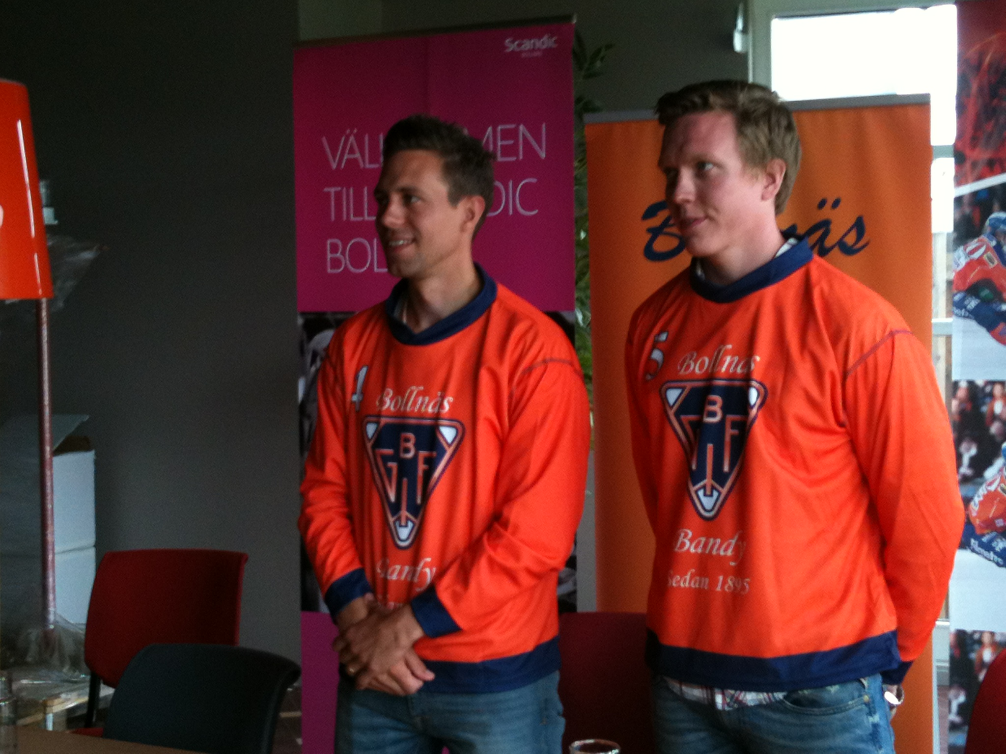 Per Hellmyrs och Daniel Berlin. Presskonferens Bollnäs